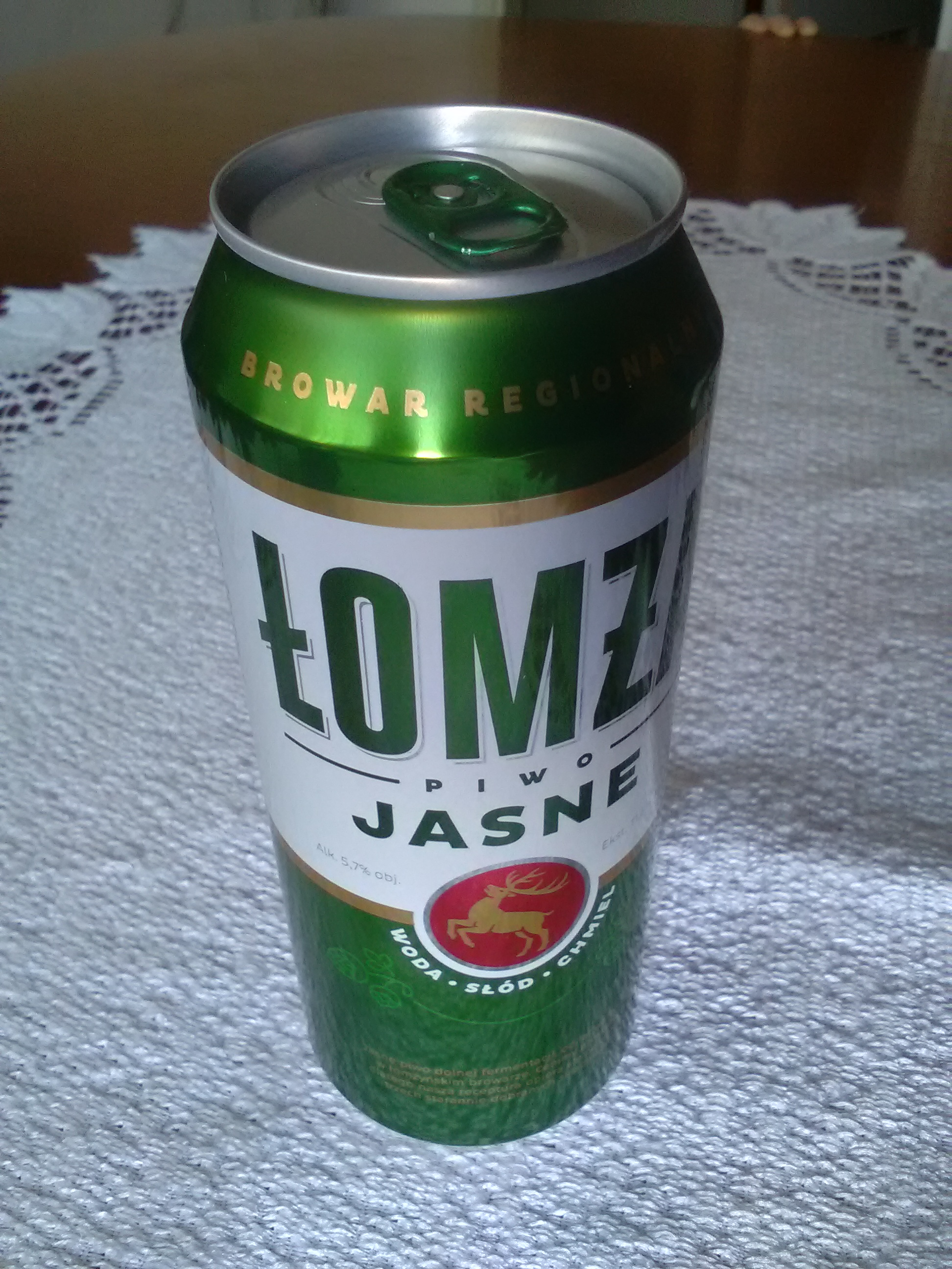 Piwo jasne Łomża browaru regionalnego.